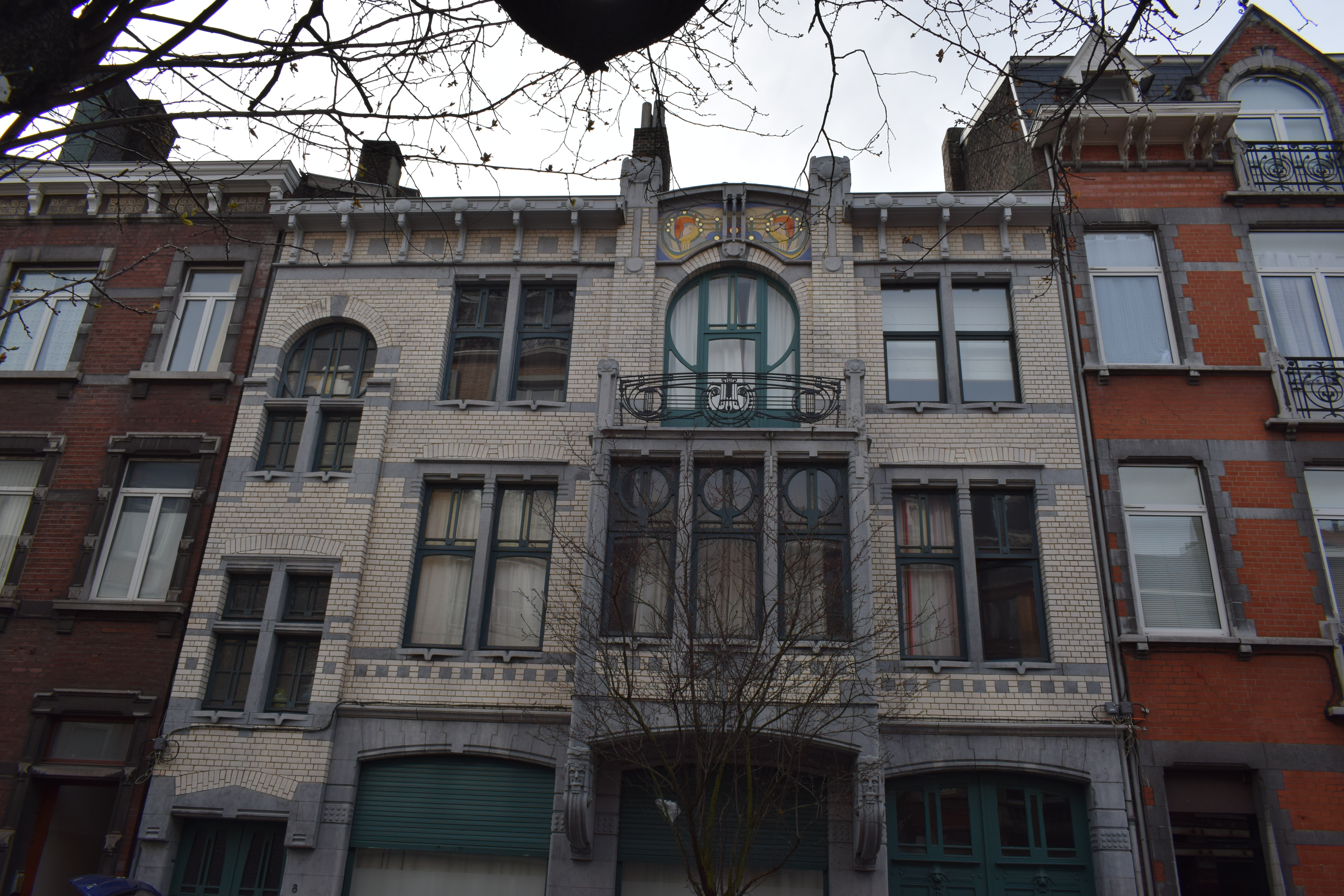 Vue de la rue du Parlement, dans le quartier d'Outremeuse à Liège (Belgique).